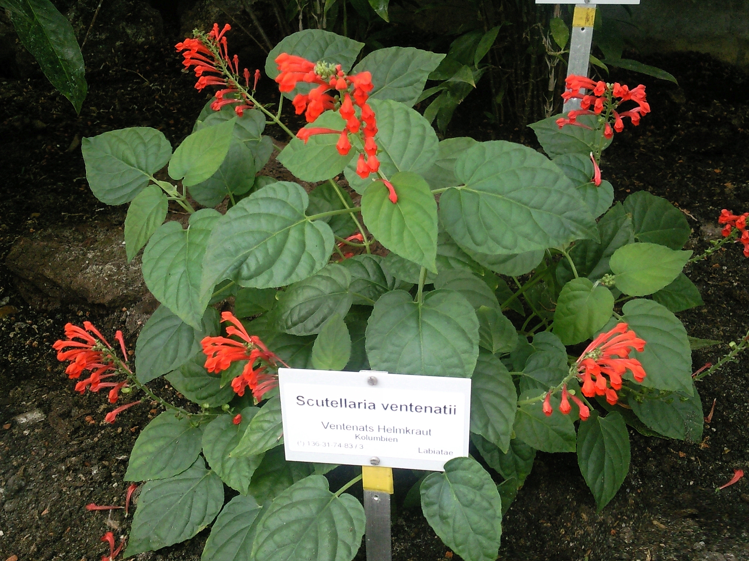 Scutellaria ventenatii; aufgenommen im Botanischen Garten Berlin